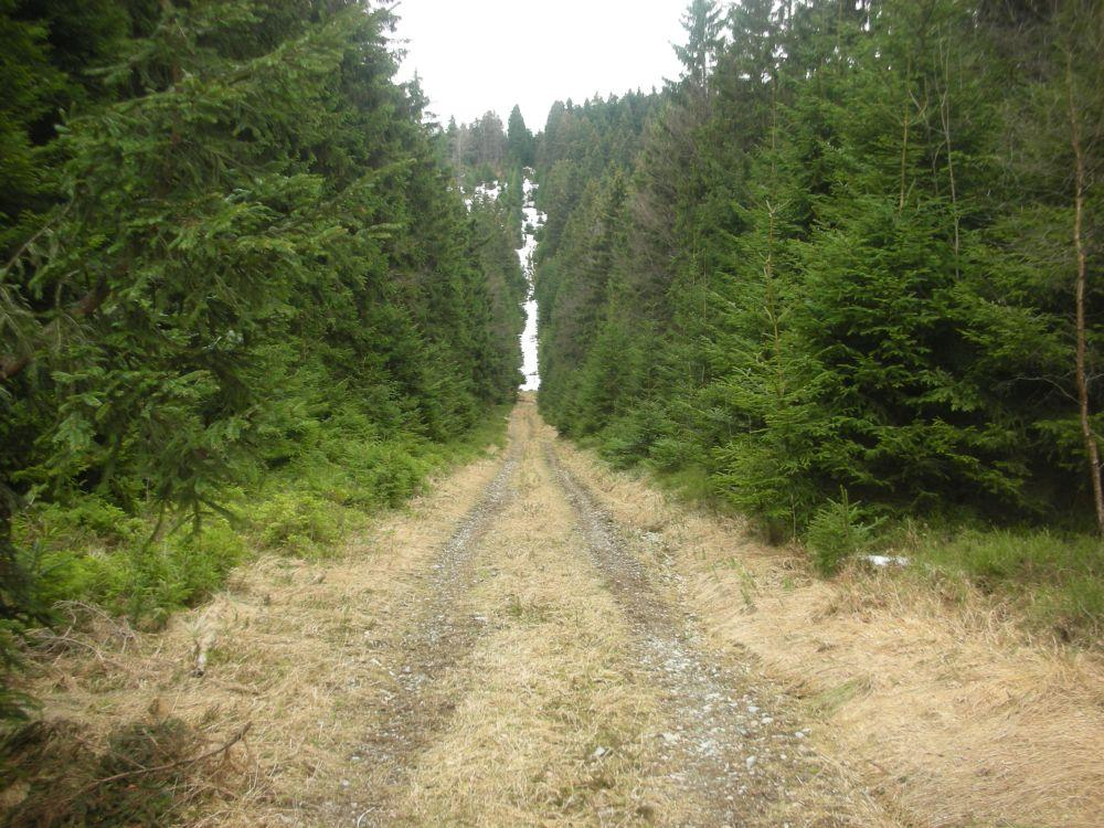 Weg zum Gipfel des Ursprungberges aus Richtung Erlbach, Ortsteil Landesgemeinde, vorbei an der Quelle des Schwarzbaches